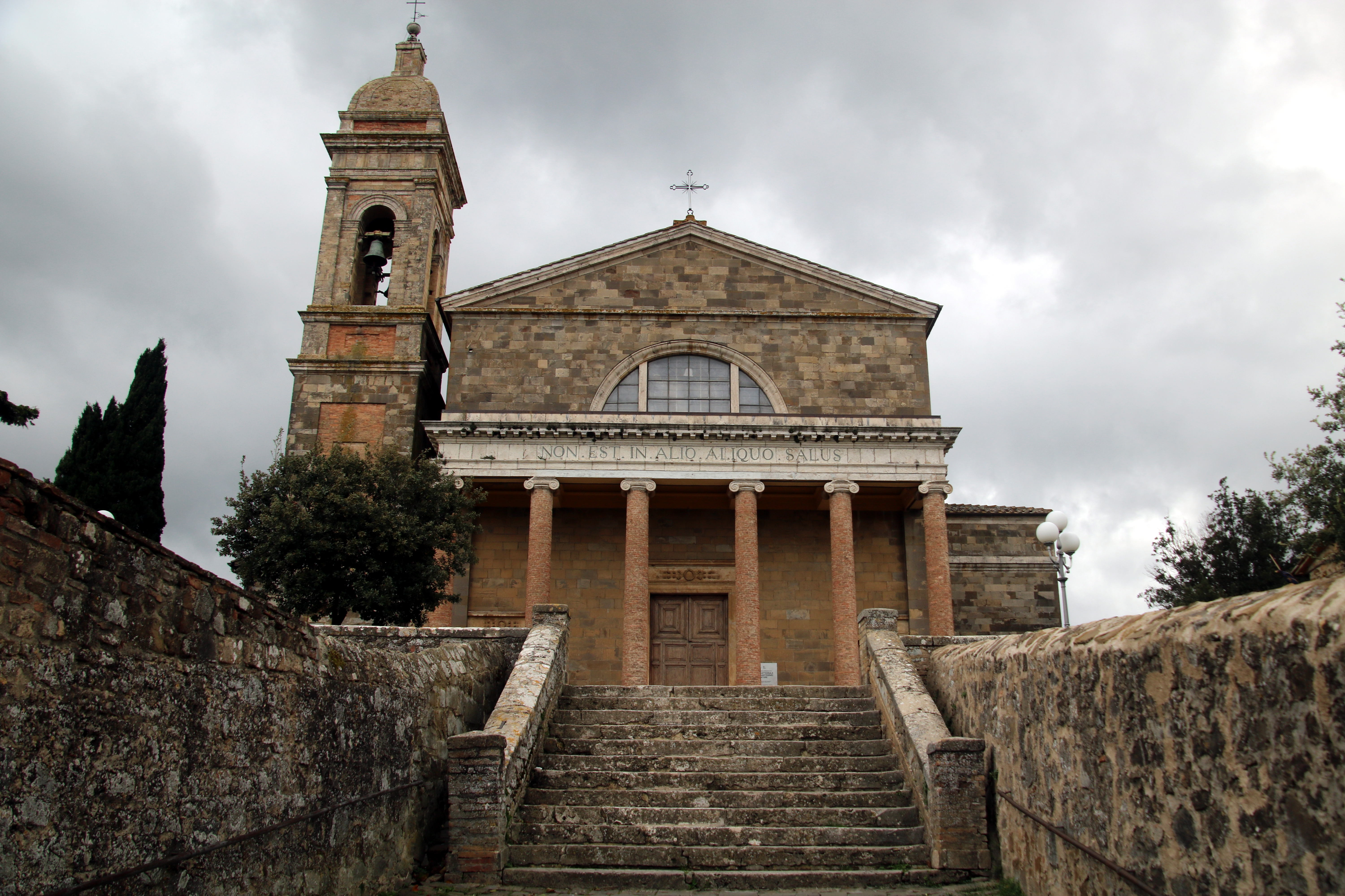 Montalcino, Concattedrale del Santissimo Salvatore, esterno